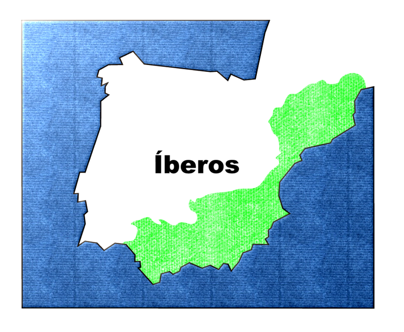 Territorio de la extensión de los íberos